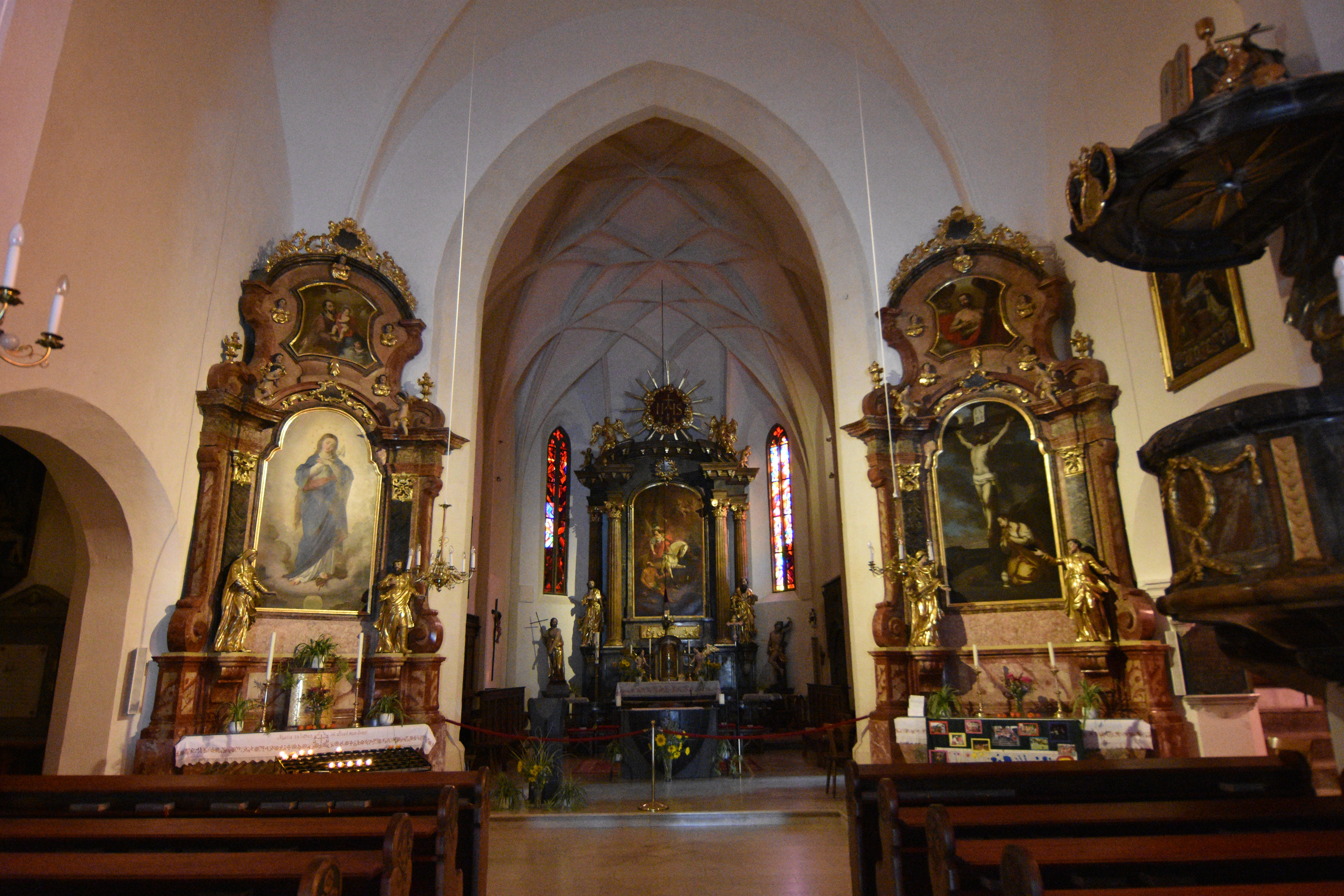 Pfarrkirche Riegersburg - Interior